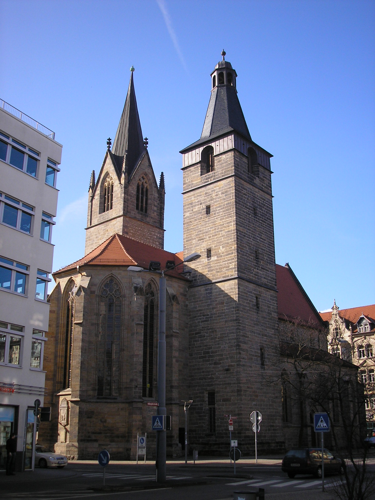 Die Kaufmannskirche in Erfurt (Thüringen).